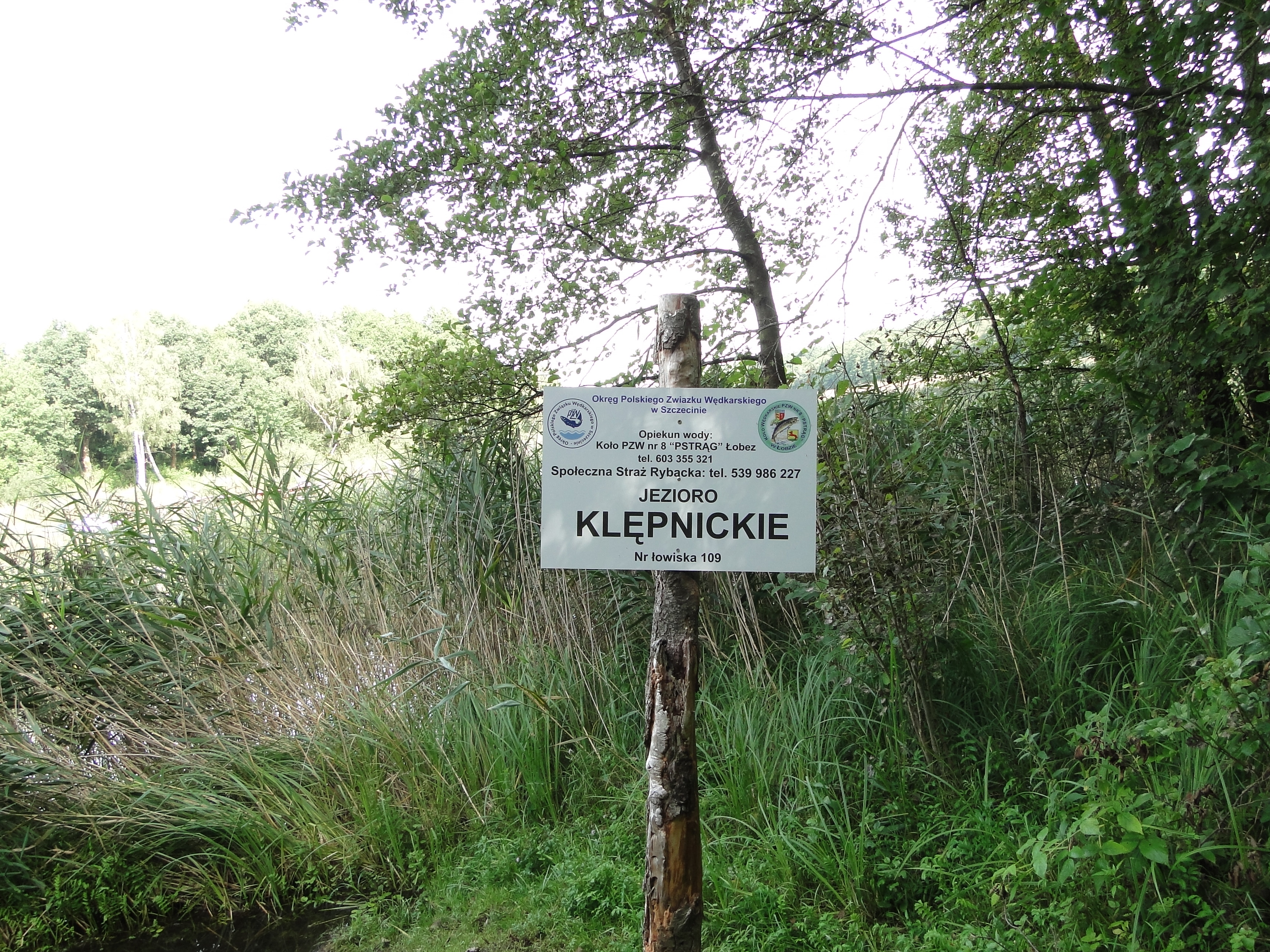 Klępnicko – jezioro na Wysoczyźnie Łobeskiej